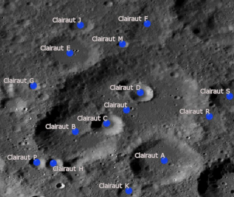 Cráter Clairaut (LRO). Cráteres satélite